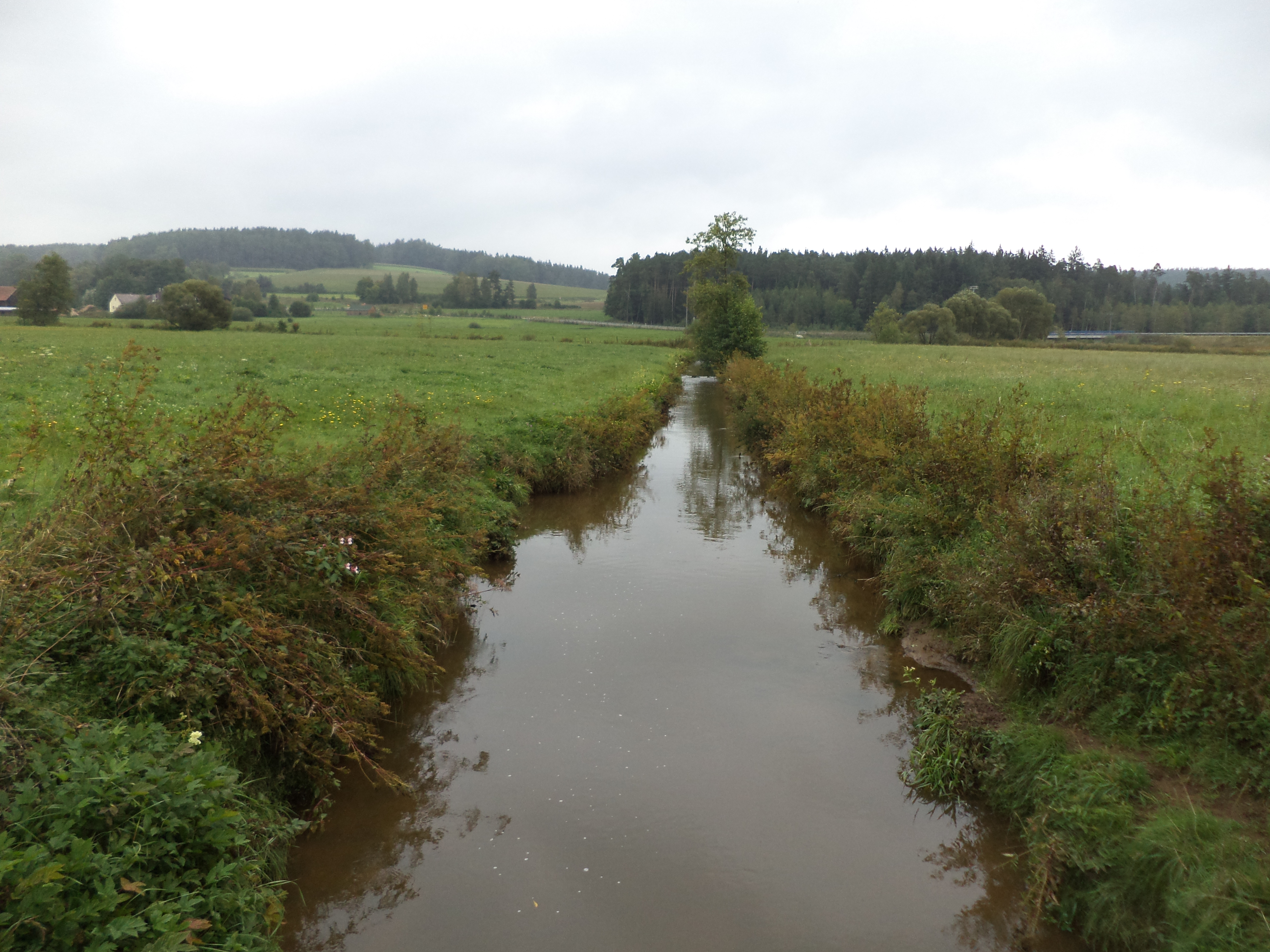 Die Fichtenohe nördlich von Pegnitz